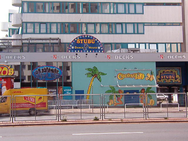 Discothek "StuBu" in Bremen (Germany)